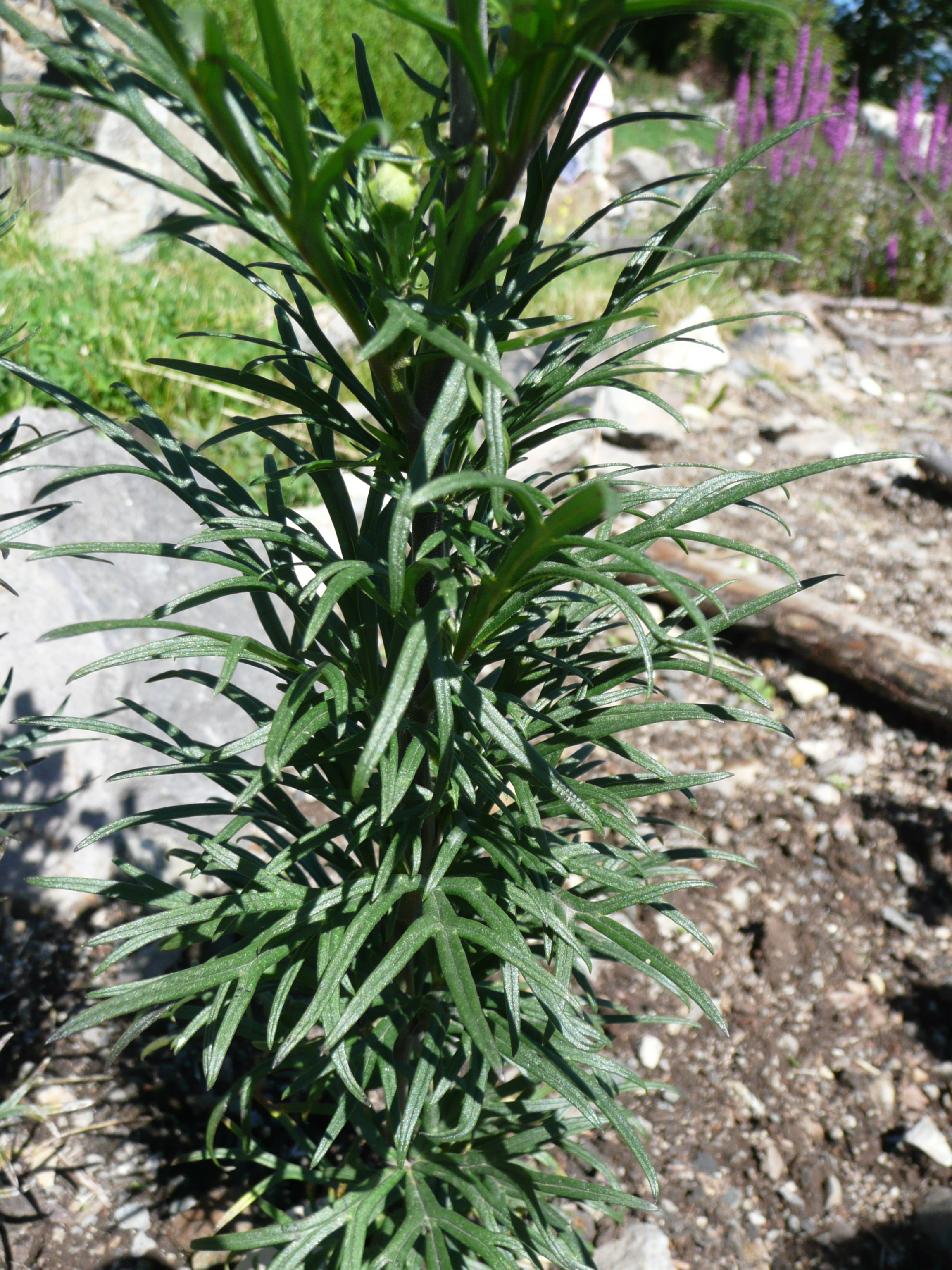 Aconit anthore (Aconitum anthora) dans le Jardin Botanique de l'Aubrac ( Espèce identifiée par une étiquette verte. Map: 44° 37' 17" N 02° 59' 13" E